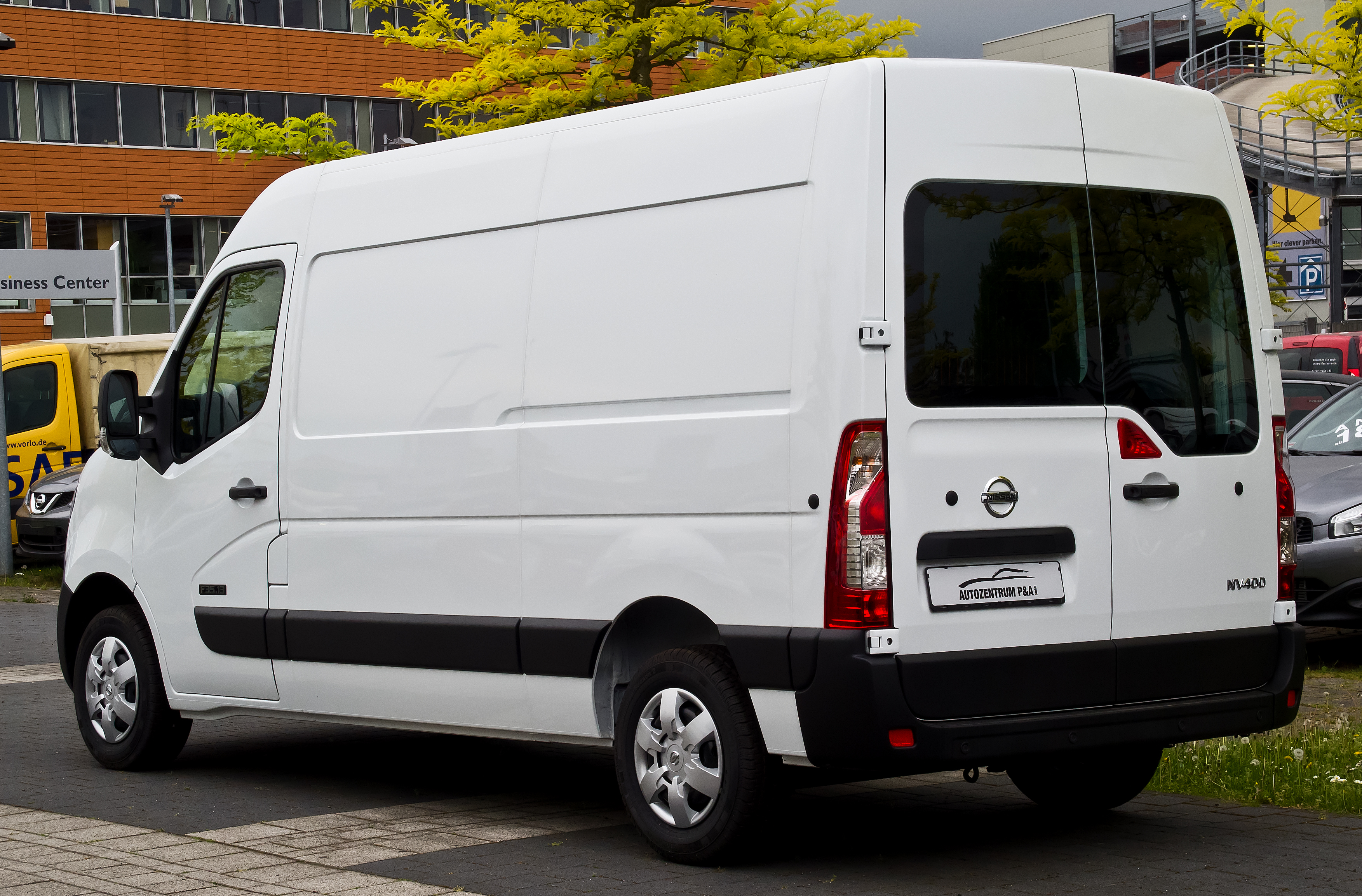 Nissan NV400 Kastenwagen dCi 100